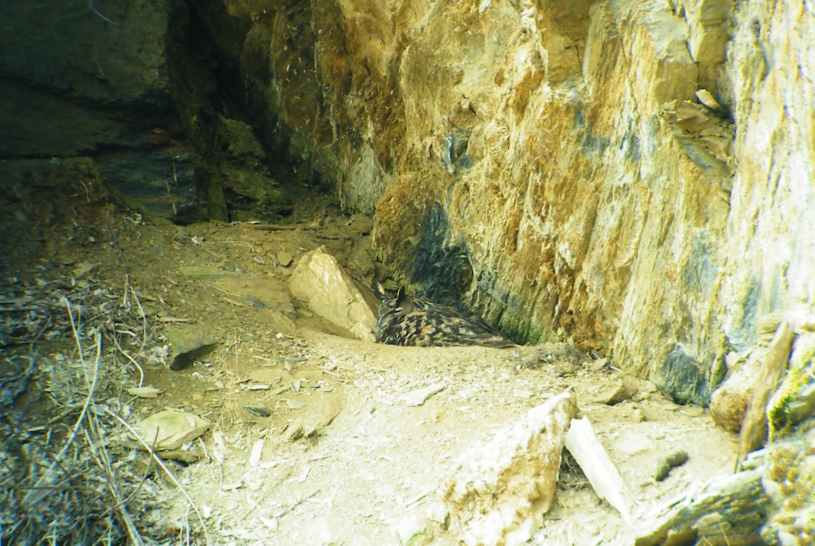 Brütendes Uhuweibchen in einem stillgelegten Steinbruch in Bestwig im Hochsauerlandkreis (Nordrhein-Westfalen, Deutschland) durchs Spektiv aufgenommen. Brooding female eagle owl in a disused quarry in Bestwig Hochsauerlandkreis (North Rhine-Westphalia, Germany)